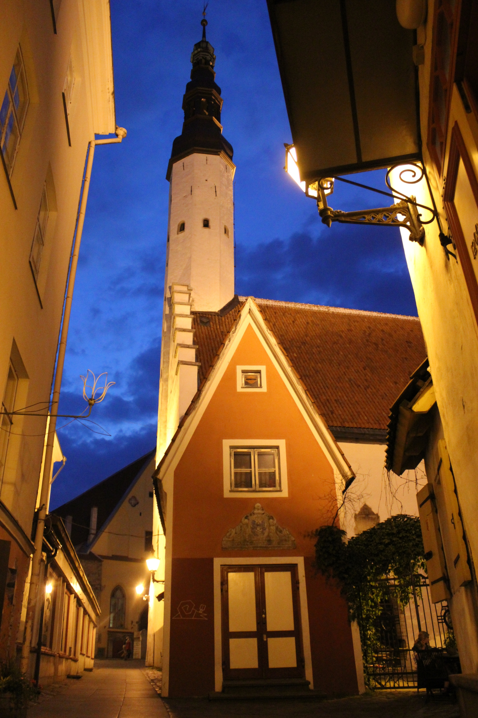 In der Altstadt von Tallinn. Turm der Heiliggeistkirche.